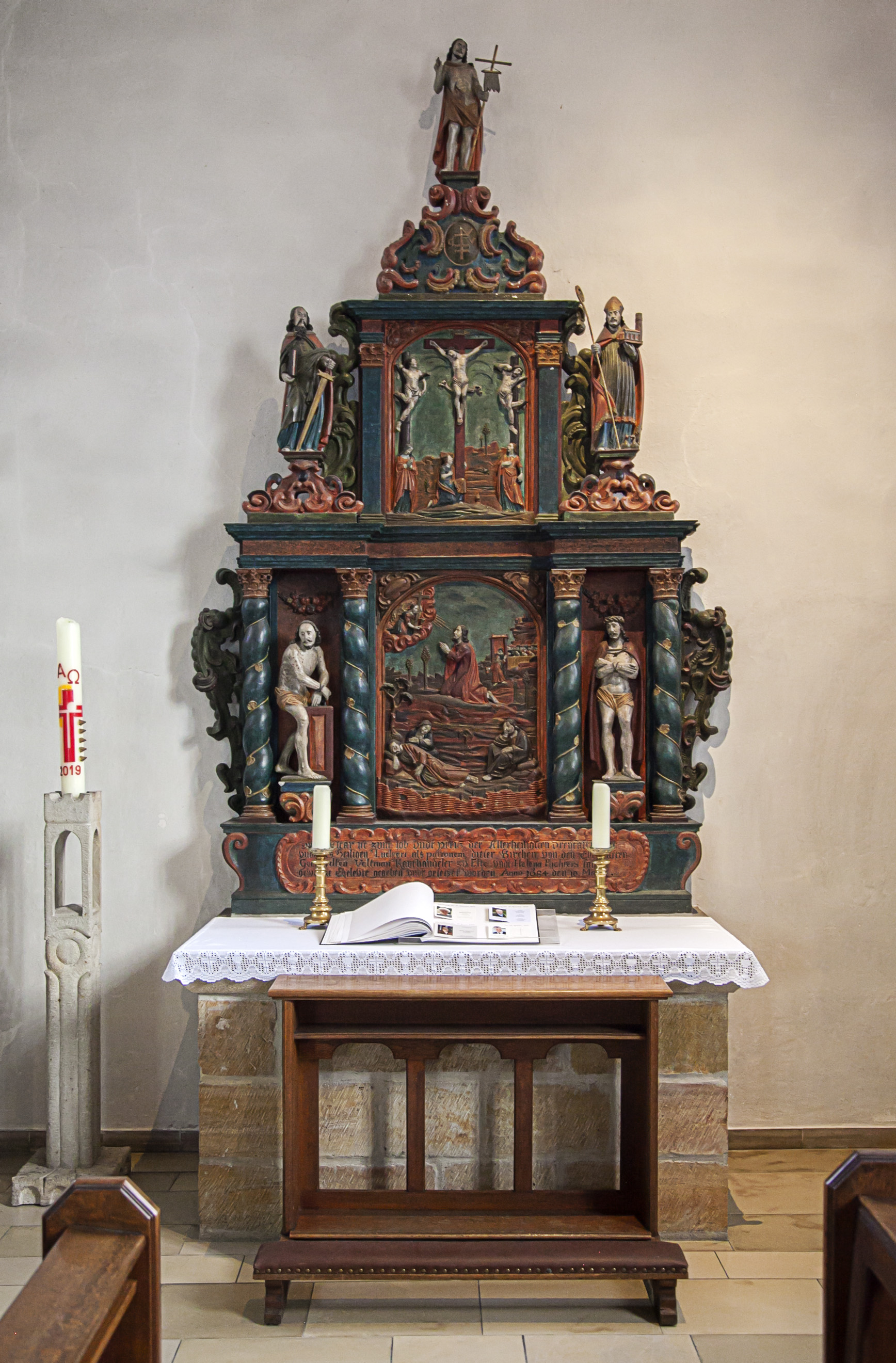 Elte, St. Ludgerus, Seitenaltar